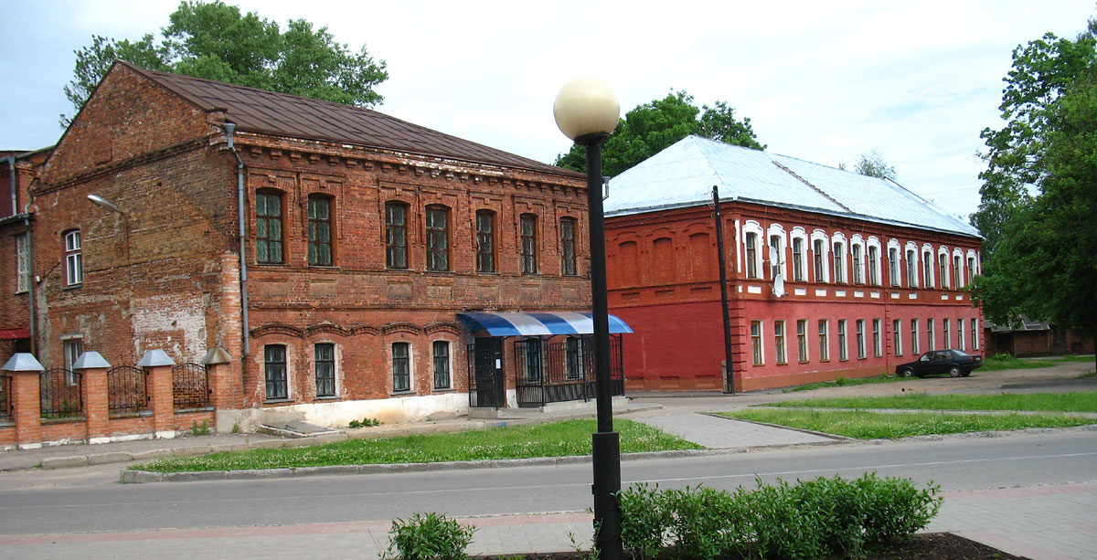 Houses at crossroad of Pakroŭskaja & Nikoĺskaja street